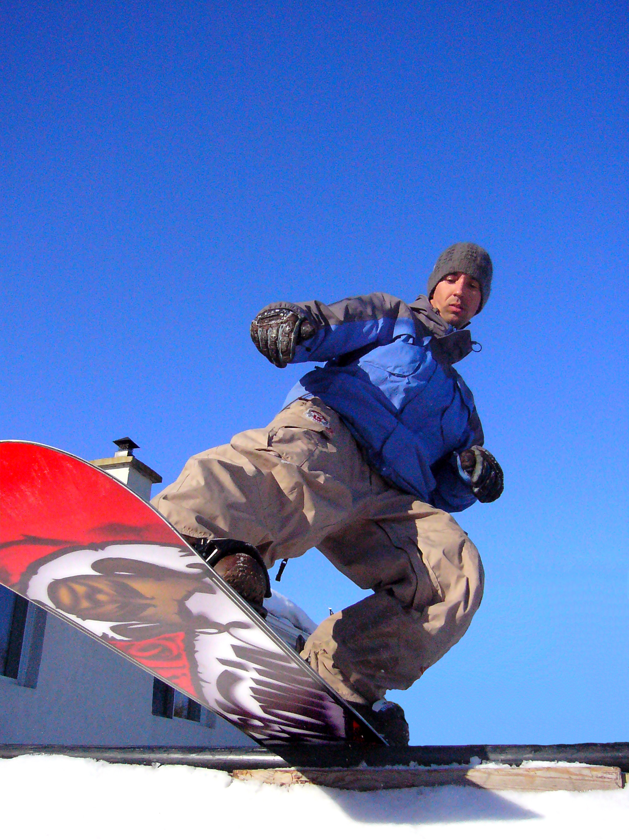 Board slide en snowboard.